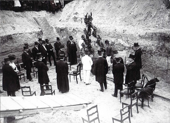 Fotografie während der Grundsteinlegung für die Lutherkirche in Soltau am 20. Juli 1910 durch Superintendent Robert Stalmann („knieend vor dem Polier der Firma Wiegels im weißen Anzug und mit Melone“) ...